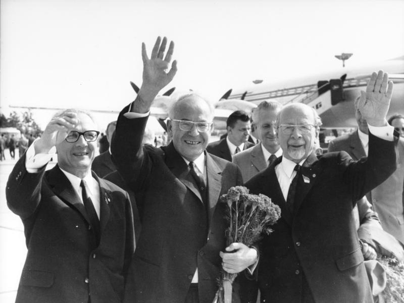 Berlin, VIII. SED-Parteitag, Honecker, Husak, Ulbricht ADN-ZB Thieme 14.6.71 Berlin: VIII. Parteitag. Delegation der KPTsch eingetroffen. Die Delegation der Kommunistischen Partei der Tschechoslowakei unter der Leitung des Generalsekretärs des ZK, Dr. Gustav Husak (Mitte), traf am 14.6.71 auf dem Zentralflughafen Berlin-Schönefeld ein. Die Abordnung wurde herzlich empfangen von den Mitglidern des Politbüros des ZK der SED Erich Honecker (links), Erster Sekretär des ZK der SED, Walter Ulbricht (r.), Günter Mittag (2. V.r., halbverdeckt) und weiteren Mitgliedern der Parteiführung. [Berlin.- Erich Honecker, Dr. Gustav Husak, Walter Ulbricht in die Kamera winkend] Abgebildete Personen: Honecker, Erich: Staatsratsvorsitzender, Generalsekretär des ZK der SED, DDR (GND 118553399) Husak, Gustav Dr.: Präsident, 1. Sekretär des Zentralkomitees (ZK) der KP, CSSR Mittag, Günter Dr.: Stellvertretender Staatsratsvorsitzender, Politbüro des ZK der SED, FDGB, DDR (GND 11897629X) Ulbricht, Walter: Staatsratsvorsitzender, Erster Sekretär des Zentralkomitees (ZK) der SED, Vorsitzender des Nationalen Verteidigungsrates, DDR